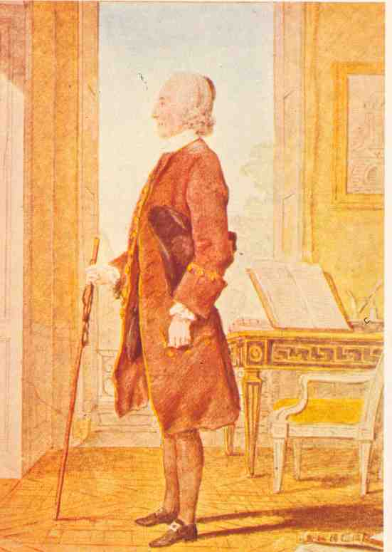 "L'abbé Allaire, ancien précépteur du duc d'Orléans" ("Abbé Allaire, former private tutor of Louis Philippe d'Orléans (1725-1785)"). Portrait by Carmontelle, Musée de Condé, Chantilly, France.